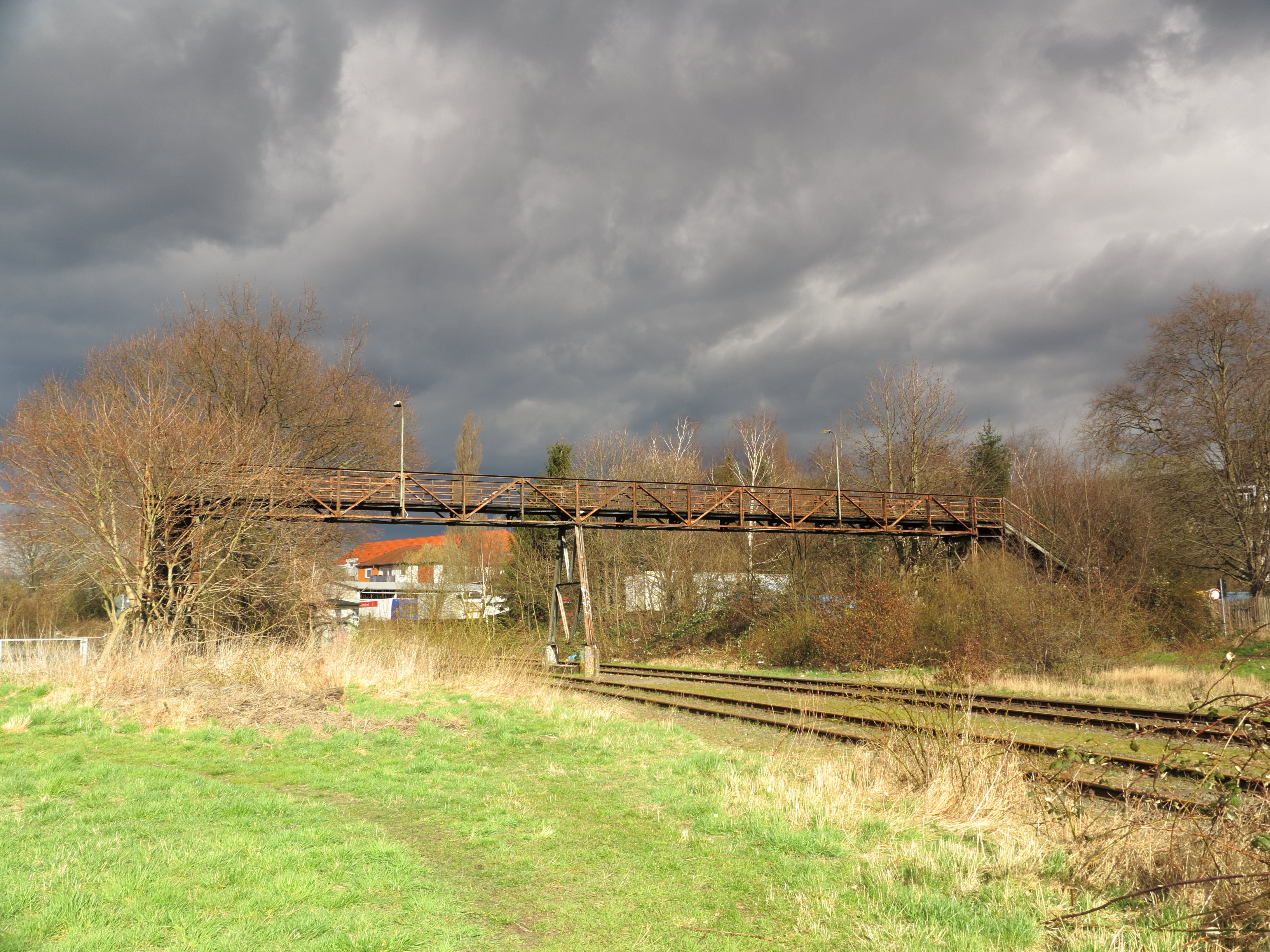 Die Fußgängerbrücke über die Gleise des ehemaligen Bahnhofes Braunschweig Nord. Die Gleise sind teilweise abgebaut und die baufällige Brücke ist gesperrt.